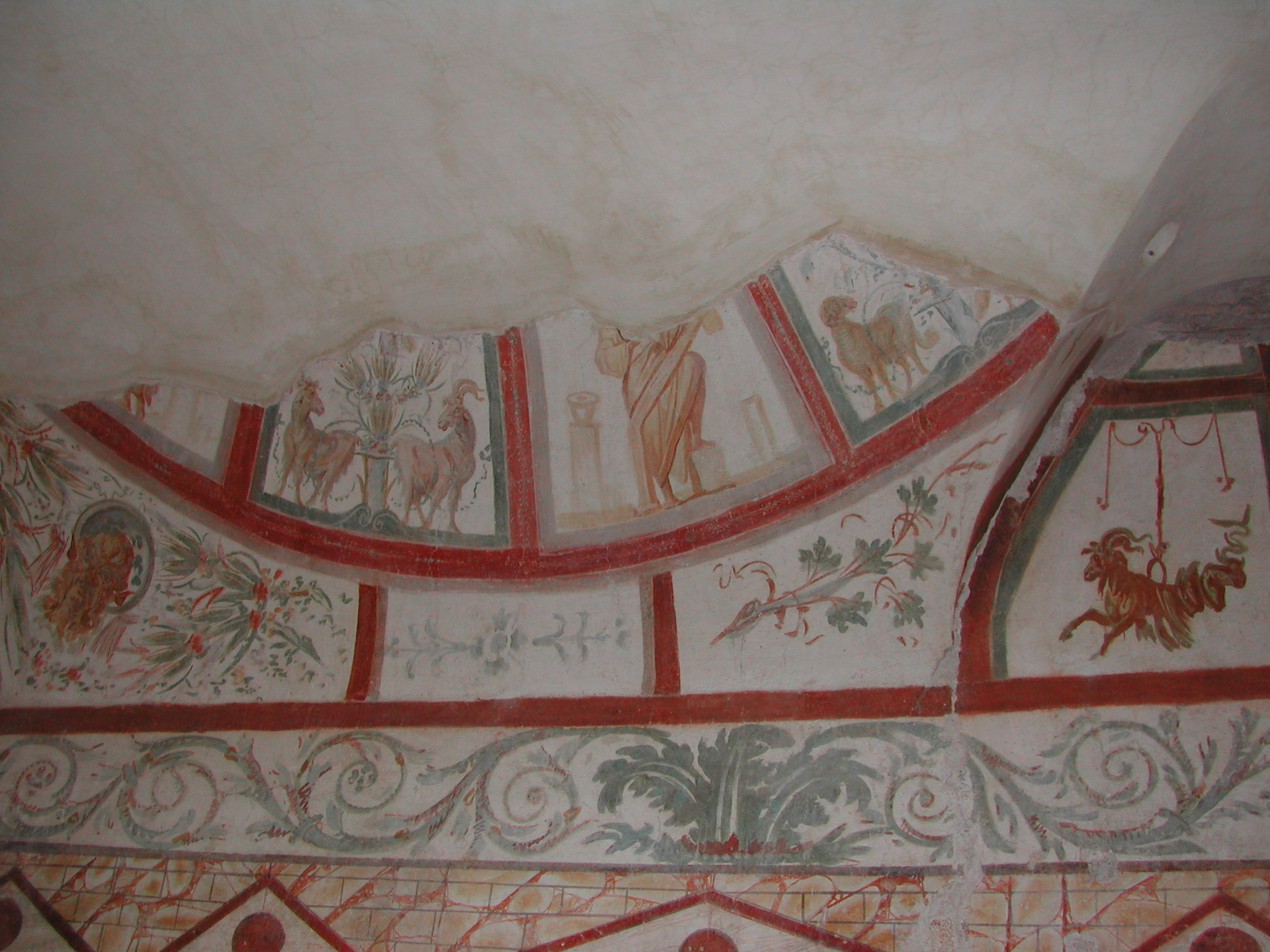 Roma, casa romana sotto la basilica dei santi Giovanni e Paolo al Celio - affreschi.